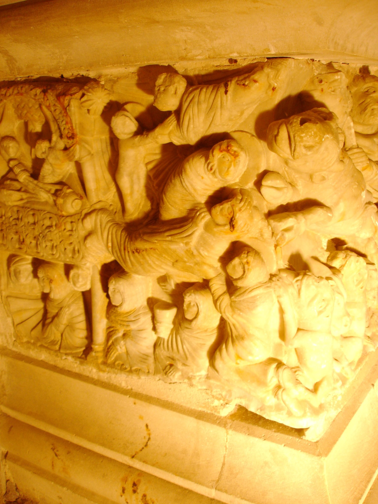 Abbaye de Saint-Hilaire, Aude (11), Sarcophage de Saint-Sernin côté gauche